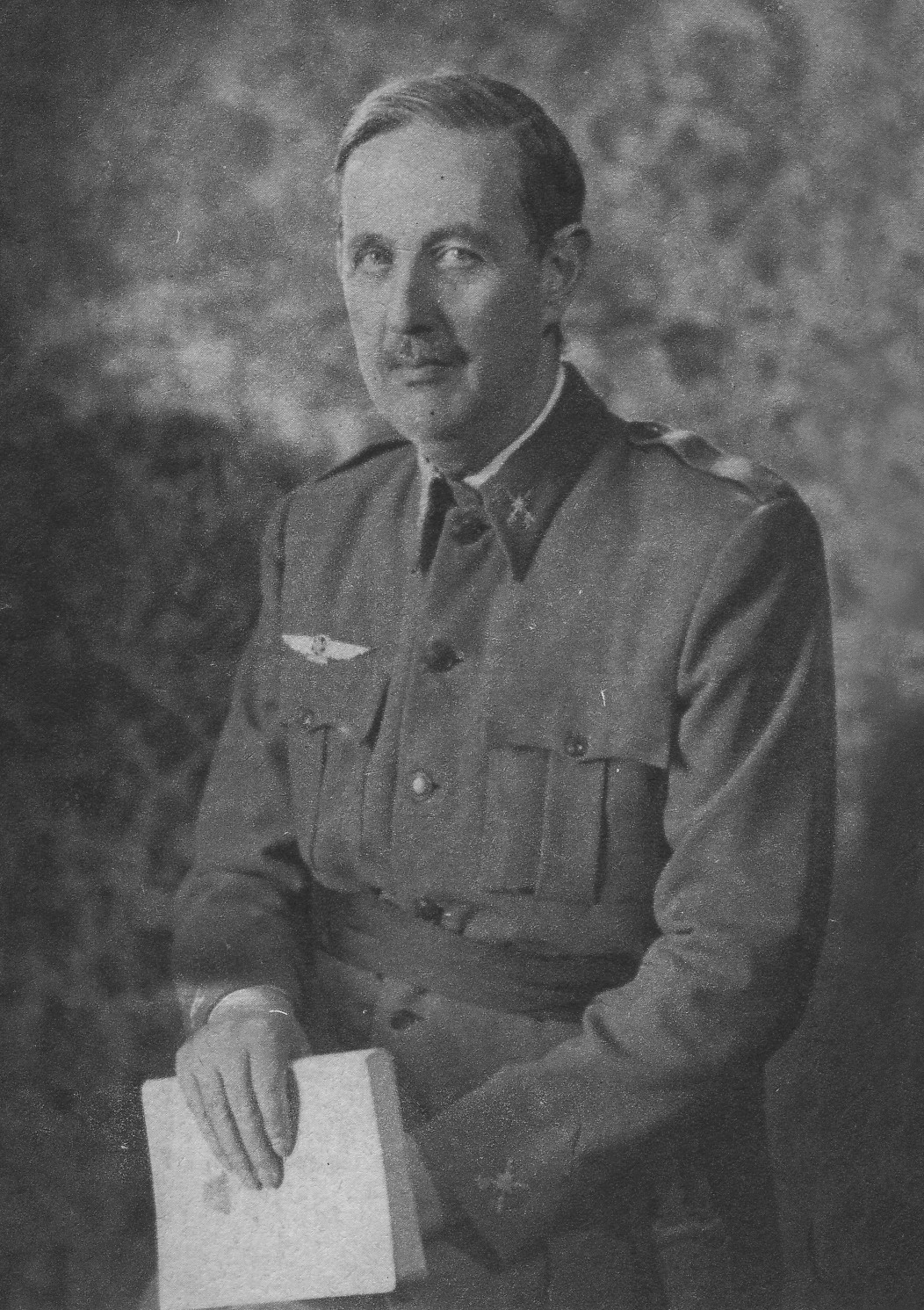 Retraro del fundador del Ejército del Aire de España